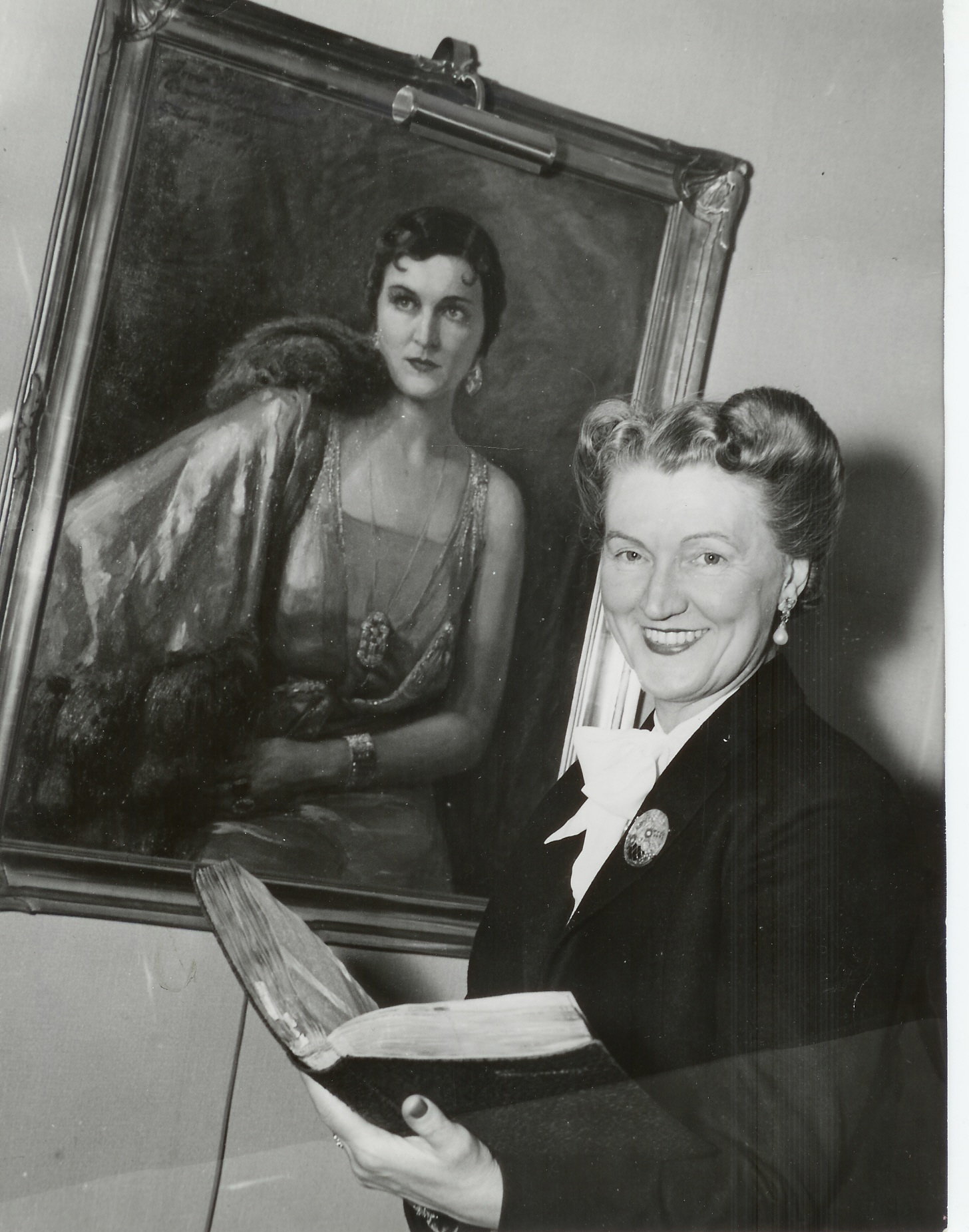 Foto på Irma Björck framför hennes porträtt som Czardasfurstinnan